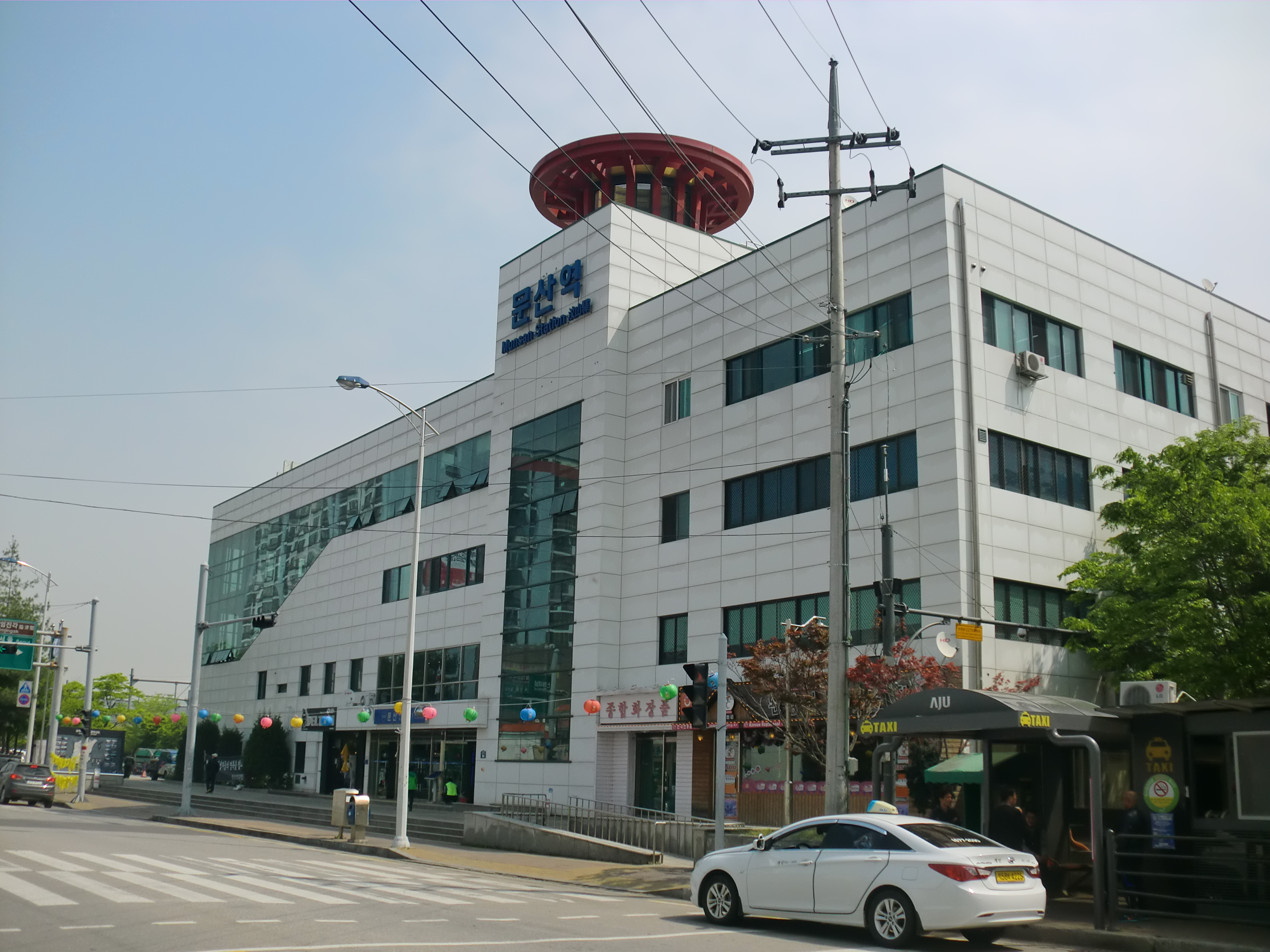 경기도 파주시에 있는 문산역